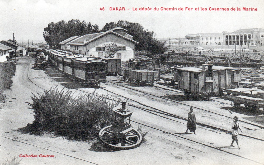 Les installations primitives de Dakar